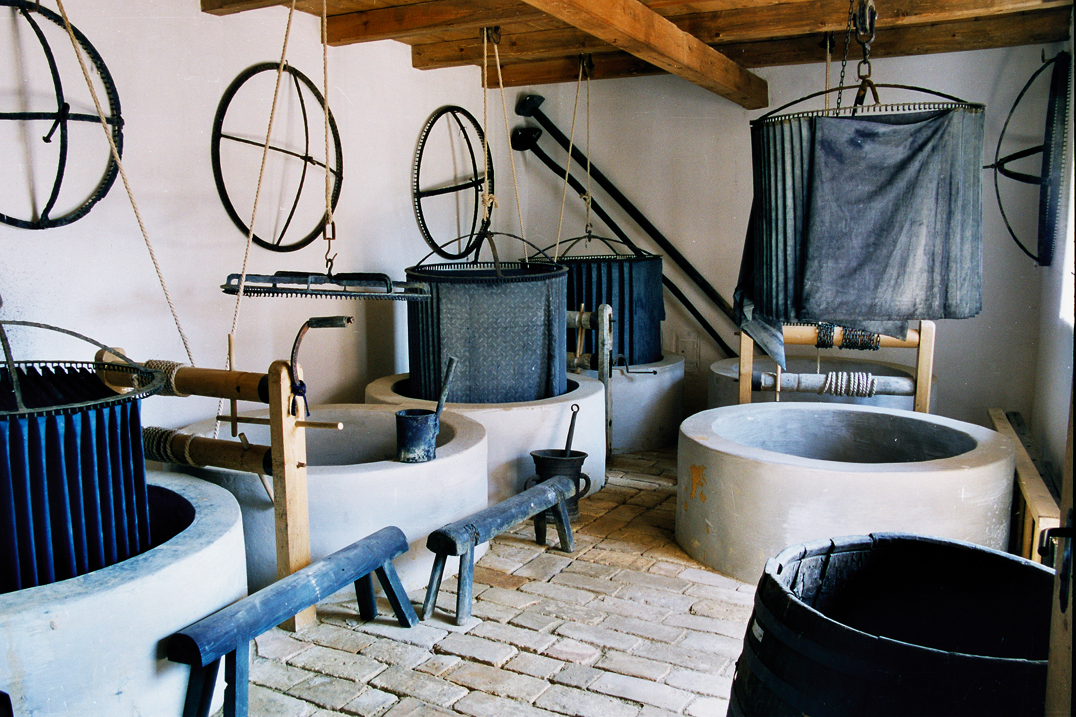 Szentendrei Skanzen, Nagykőrösi kékfestő műhely